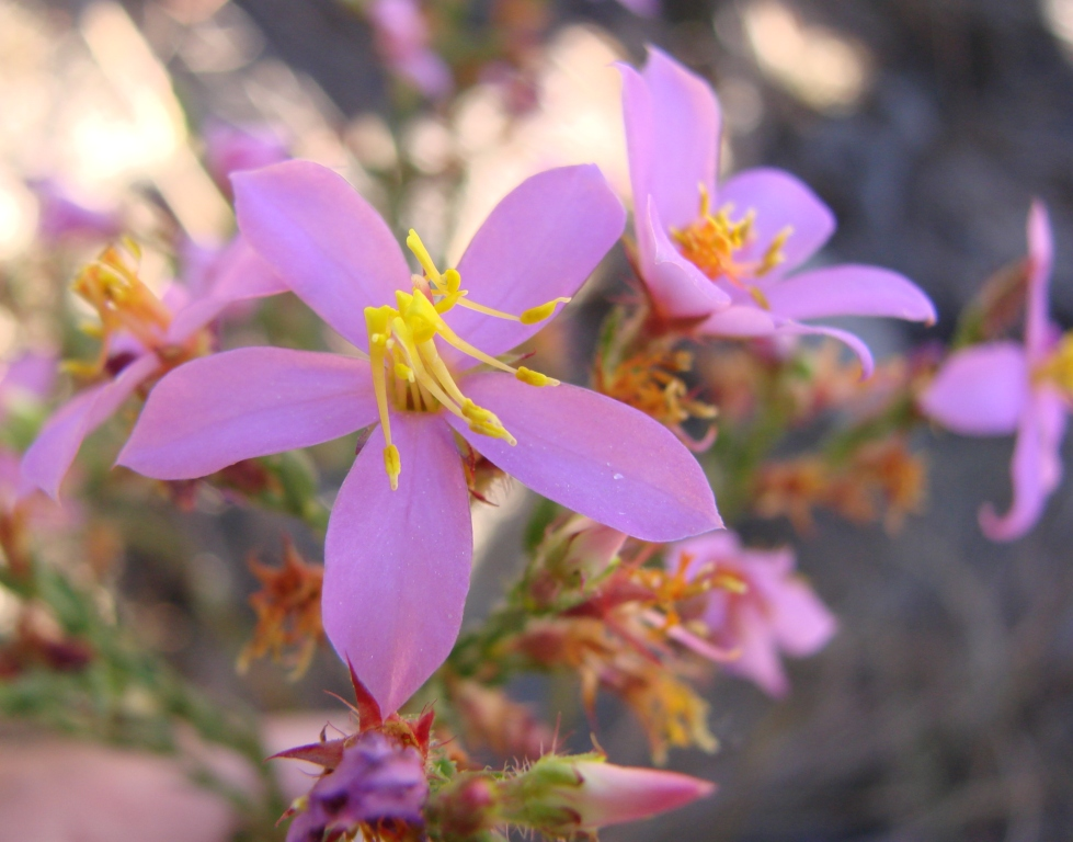 Chaetostoma selagineum (Naudin) C. Koschnitzke & A.B. Martins - MELASTOMATACEAE - Endêmica de Goiás - Parque Estadual Serra dos Pirineus - GO -Brasil